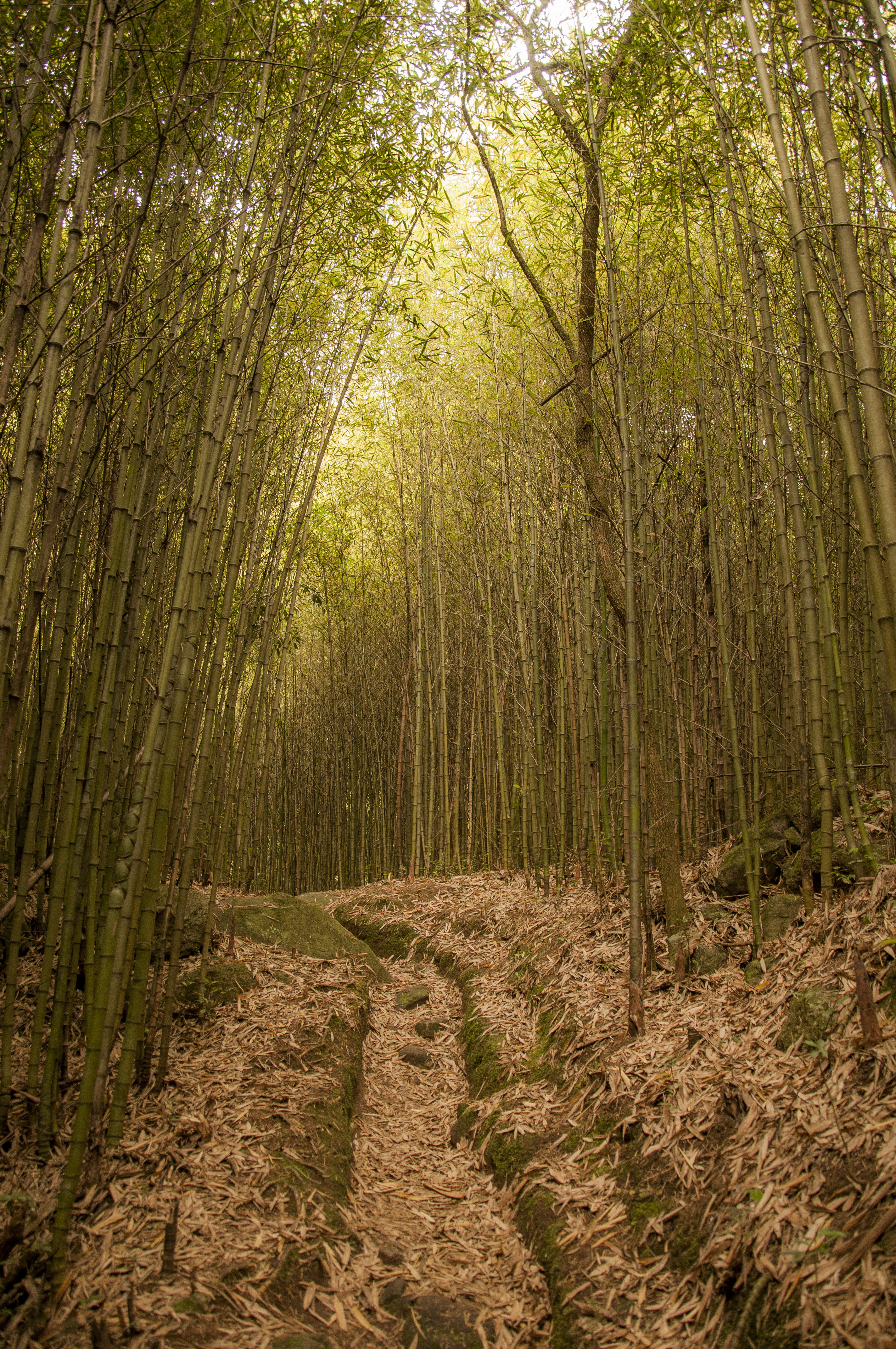 Parque Nacional da Serra dos Órgãos Sede Petrópolis